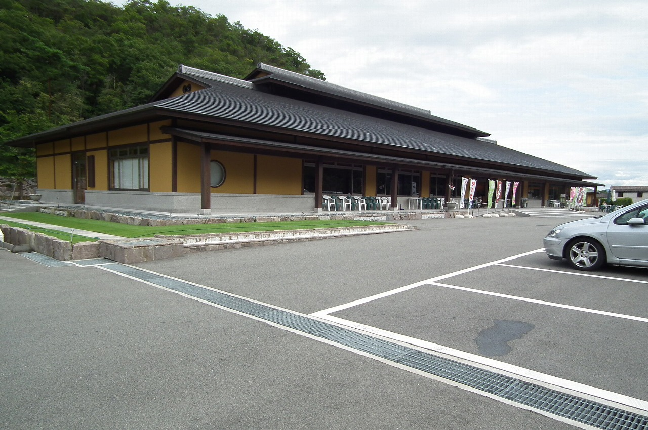 念佛宗三寶山無量壽寺 売店レストラン棟